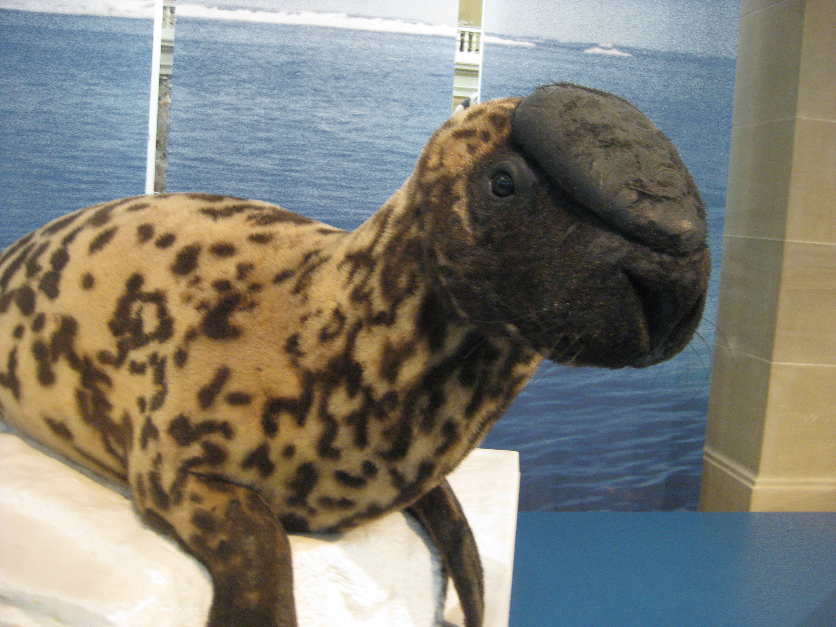 Foto, aufgenommen im Museum König, Bonn.